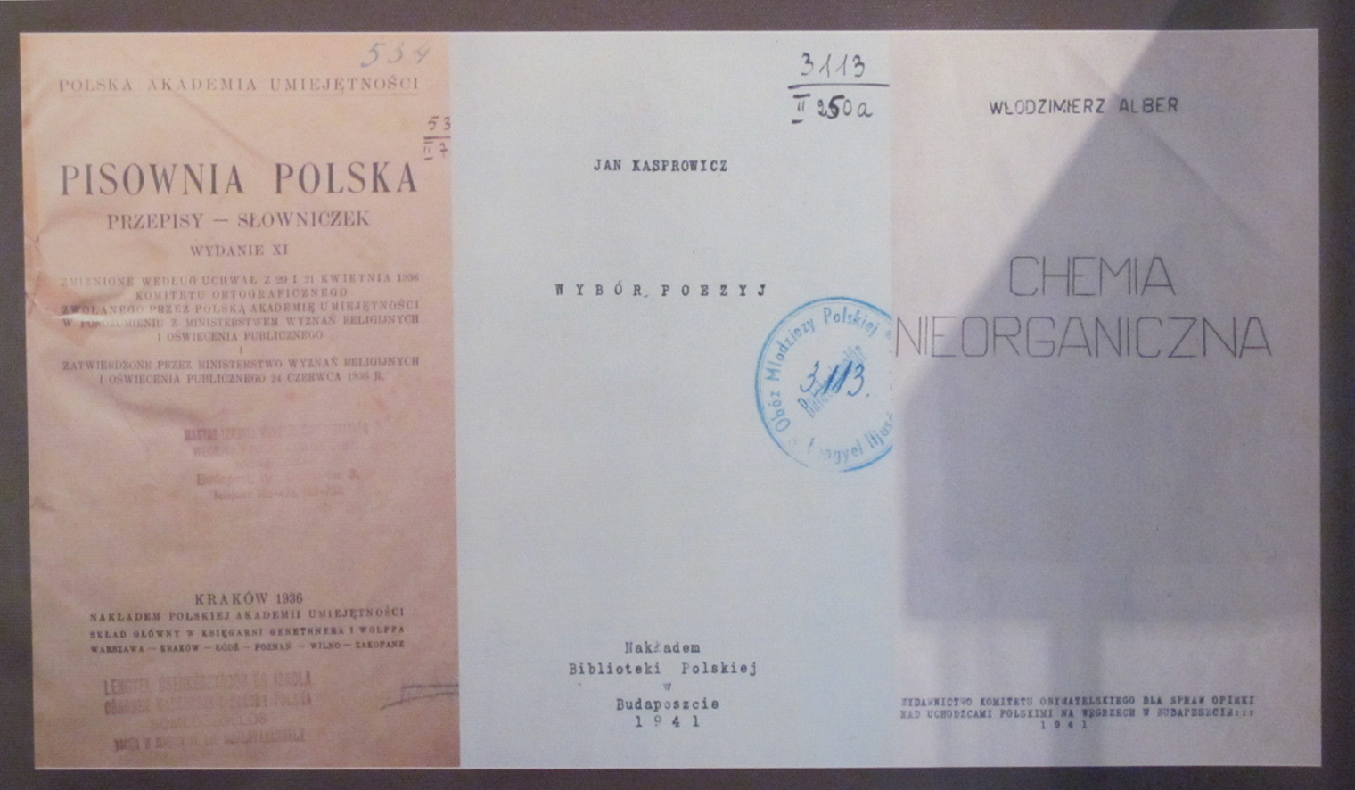 Podręcznik w szkole polskiej w BalatonboglárLengyel kisebbségi iskola dokumentuma Balatonboglárról.